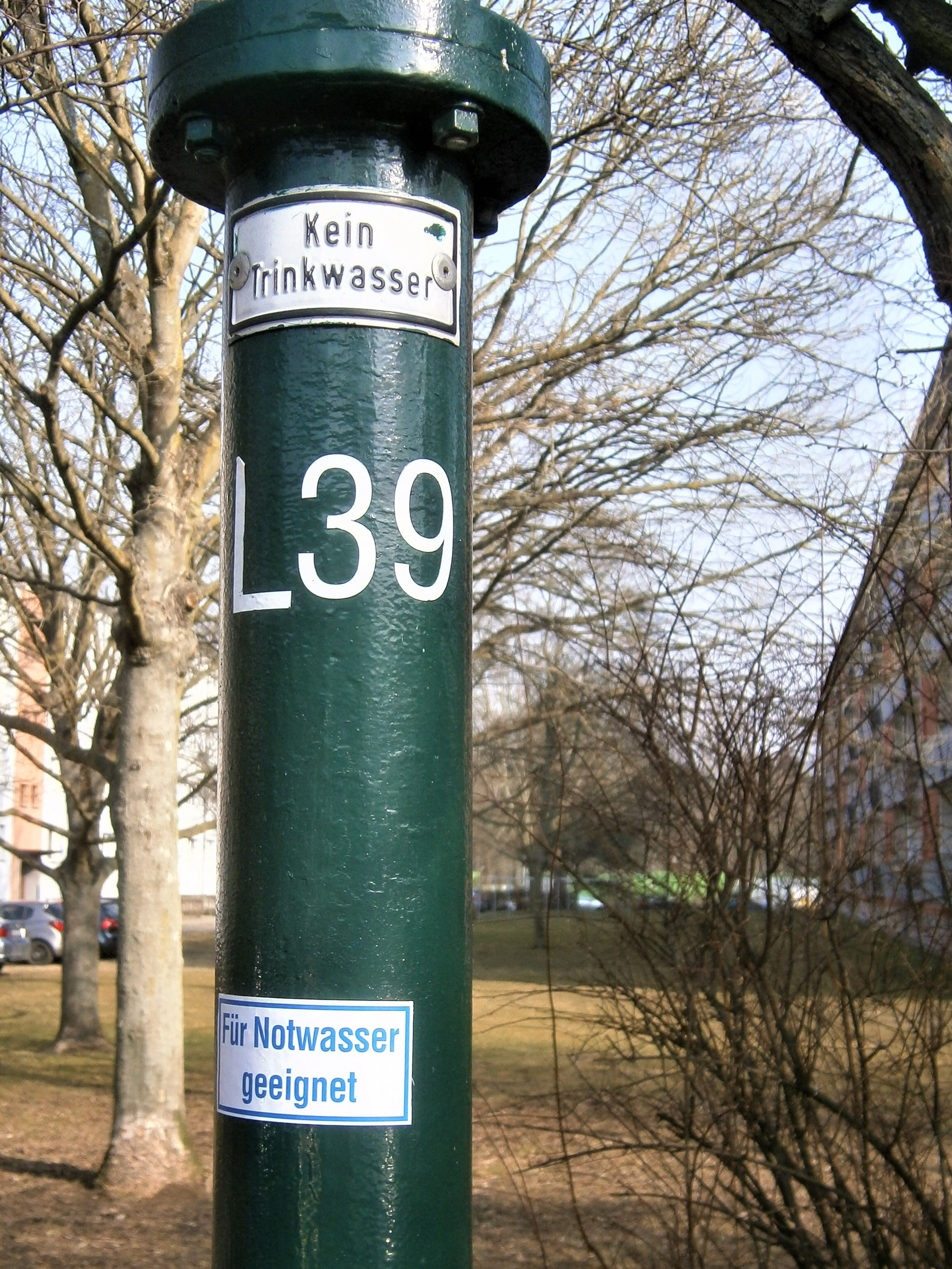 In Berlin (hier am Straßenbrunnen L39 im Ortsteil Friedrichsfelde, Bezirk Lichenberg) genügen die der Notwasserversorgung zur Verfügung stehenden "Plumpen" im allgemeinen nicht der Trinkwasserqualität. Seit den 2010er Jahren ist daher statt (negatic ausschließend) "Kein Trinkwasser" der Positiv-Hinweis der Eignung für Notwasserzwecke im Kommen.